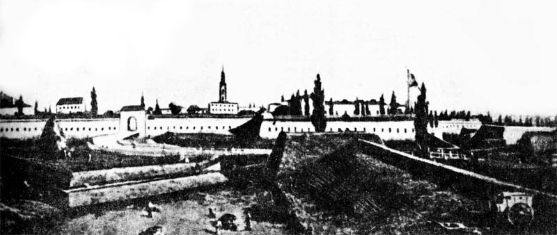 Reprodukcja obrazu olejnego "Zamość, widok na szańce i bastiony od strony północnej" Autor: Zaleski Marcin (1796-1877) Data powstania: ok. 1840-48